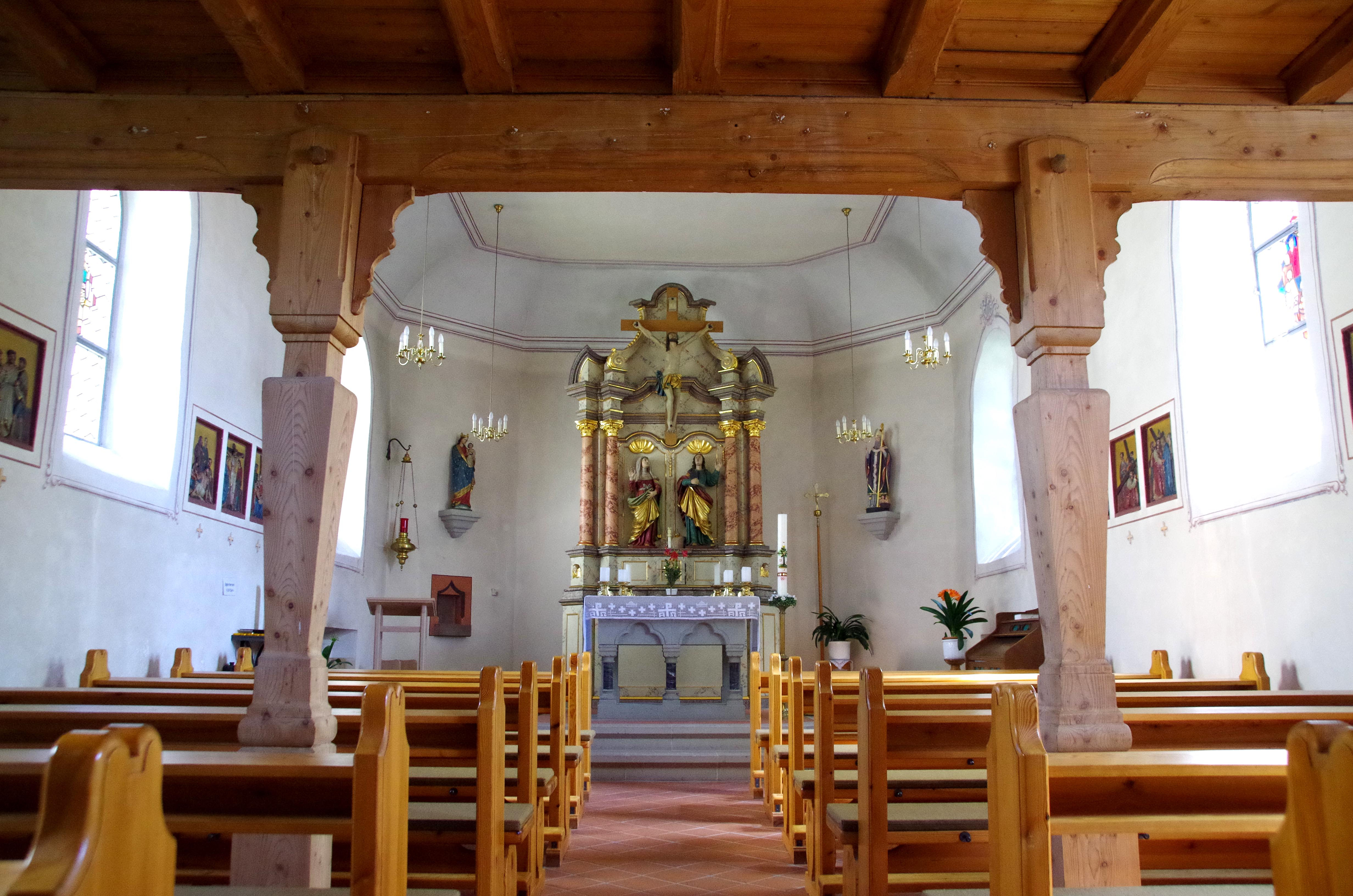 St. Nikolaus (Malbergweich), Innenraum mit Blick zum Altar